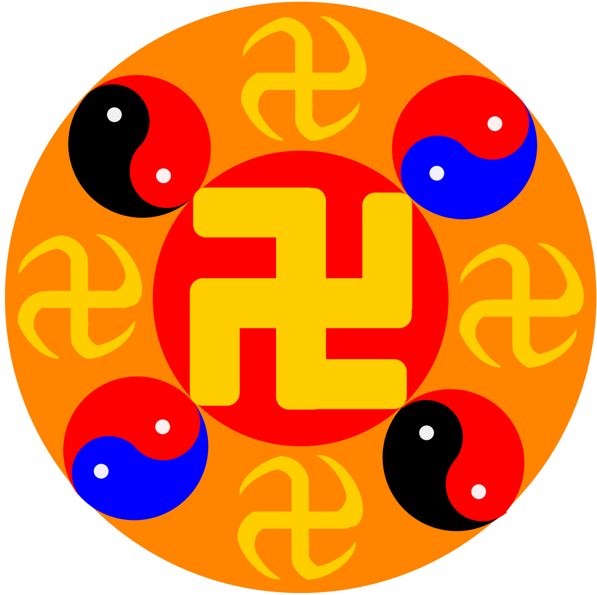 Фалун Гонг лого